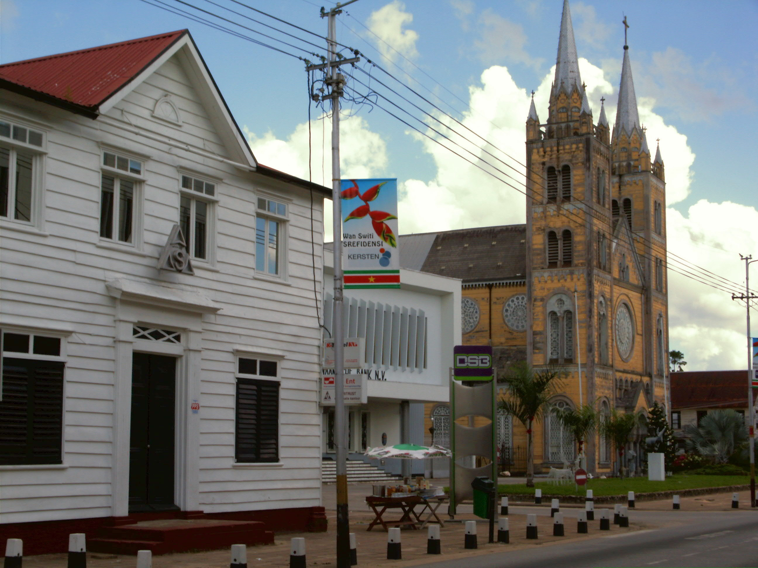 Die ganz aus Holz erbaute Kathedrale in Paramaribo, Suriname